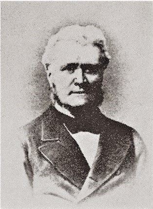 John Ostell, né à Londres le 7 août 1813 - décédé à Montréal le 6 avril 1892, est un architecte et homme d'affaires canadien.